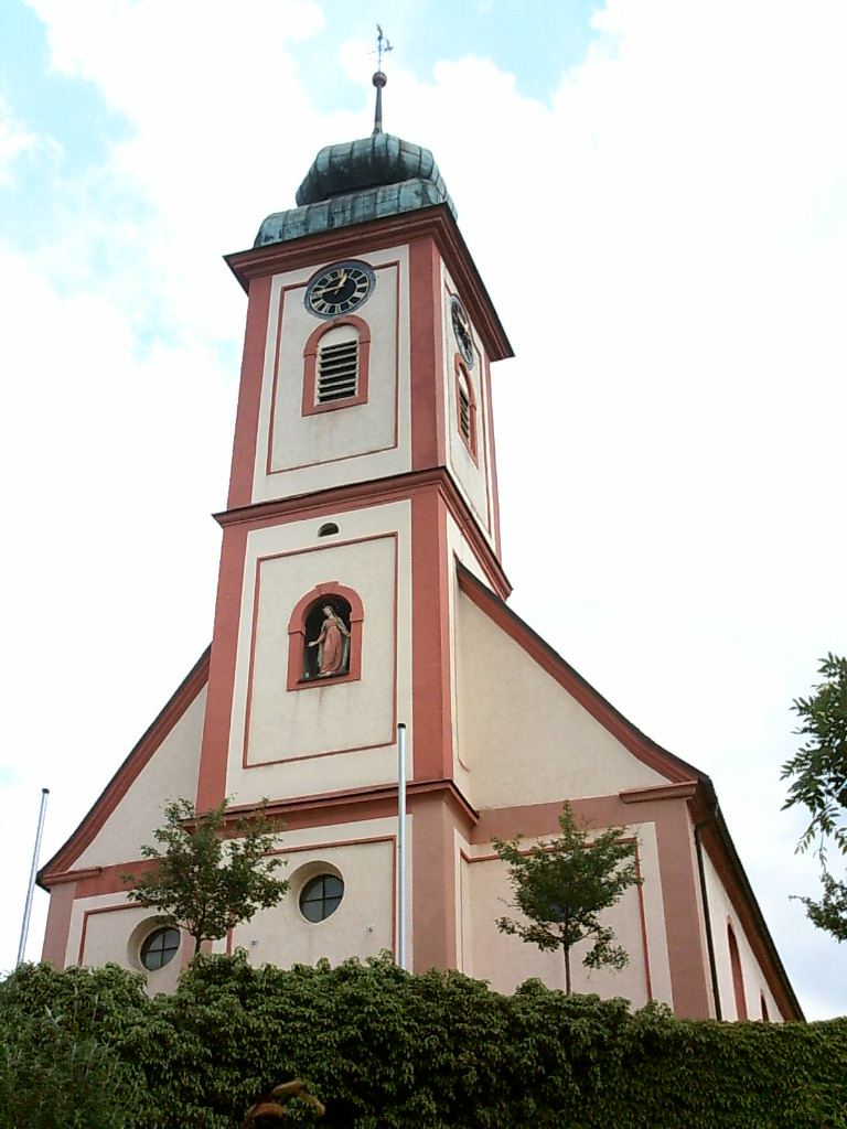 Kirche in Bad Bellingen